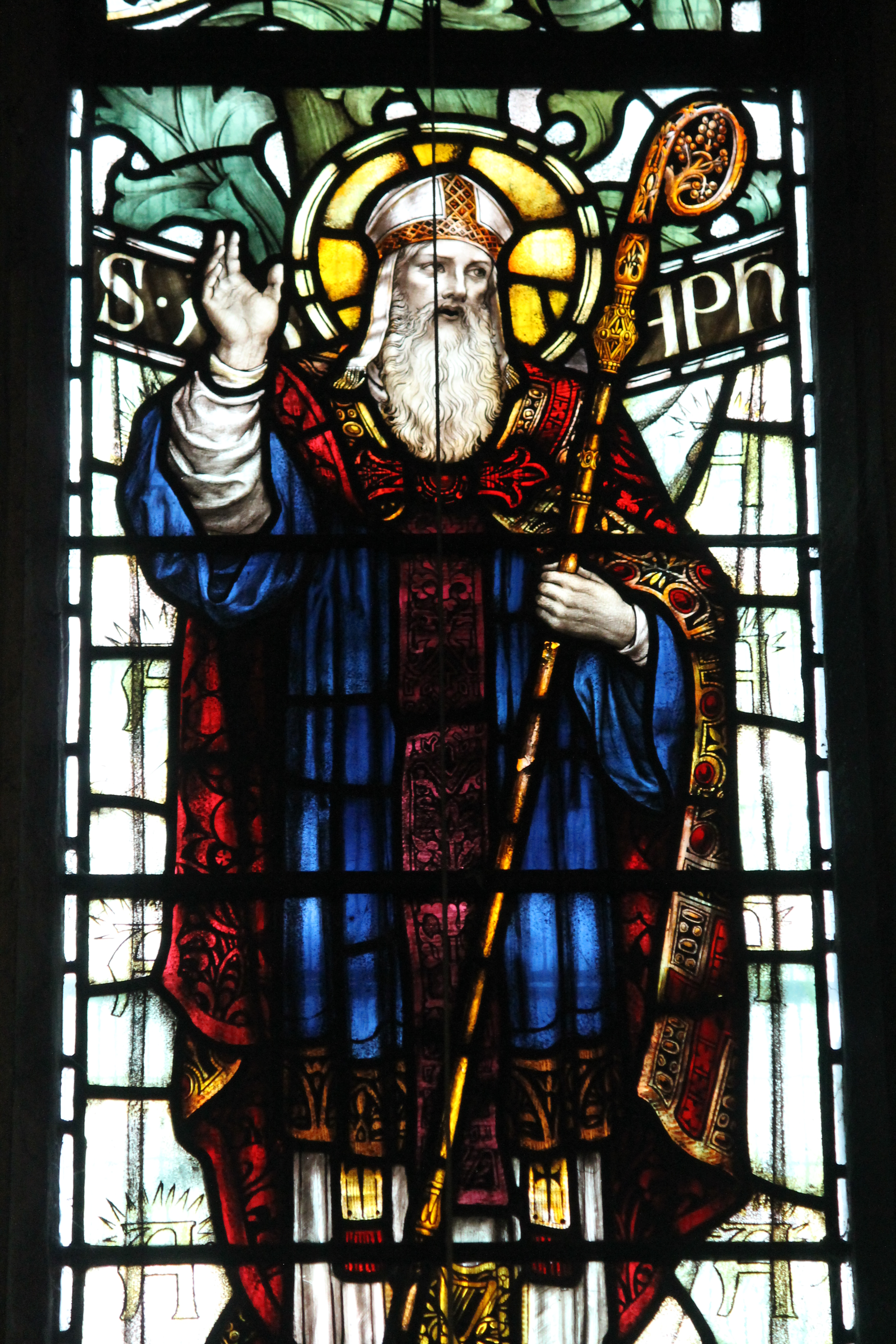 Eglwys Sant Silyn, Wrecsam